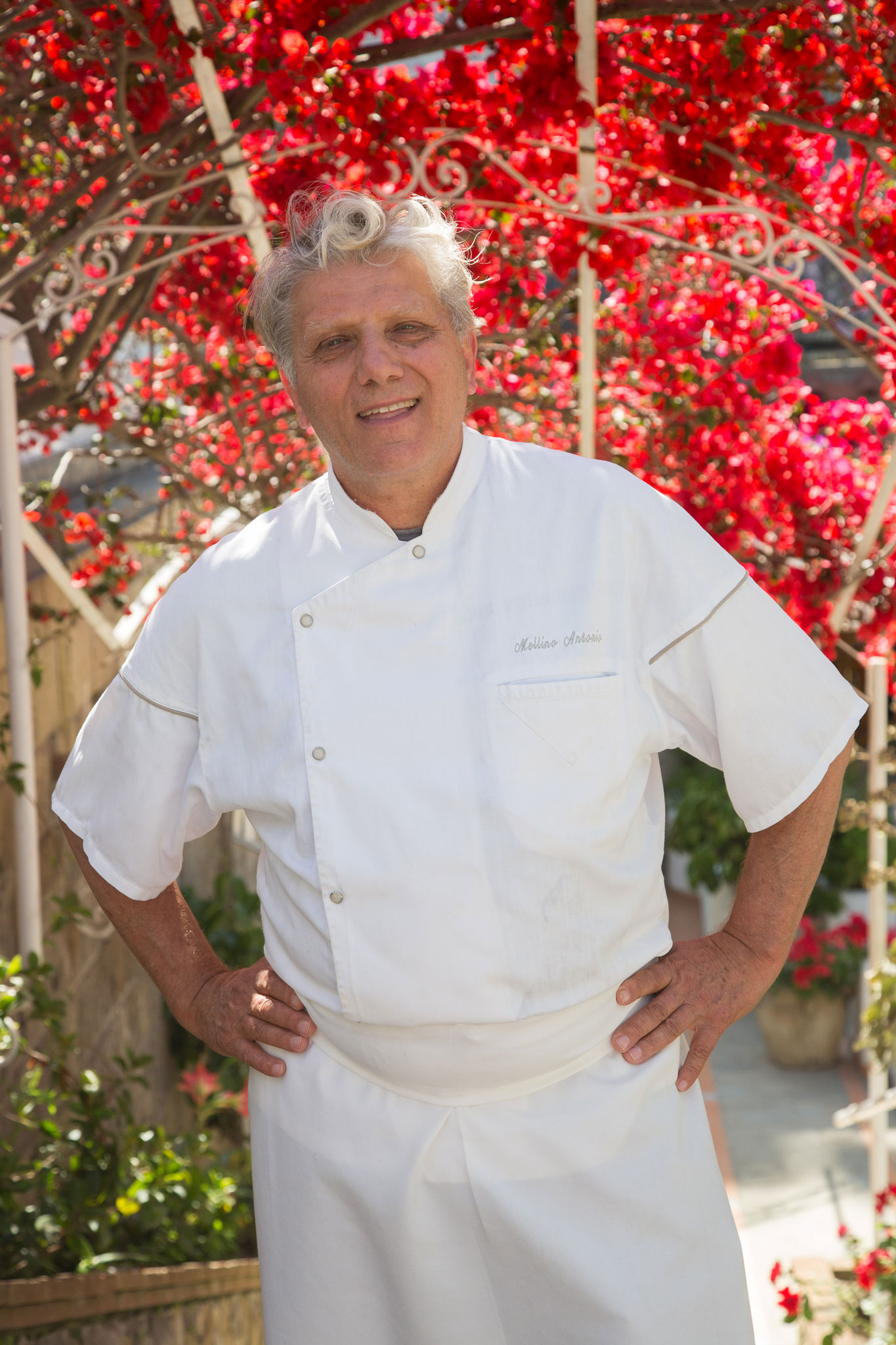 Antonio Mellino, presso il suo ristorante "Quattro Passi" a Nerano, nel maggio 2018